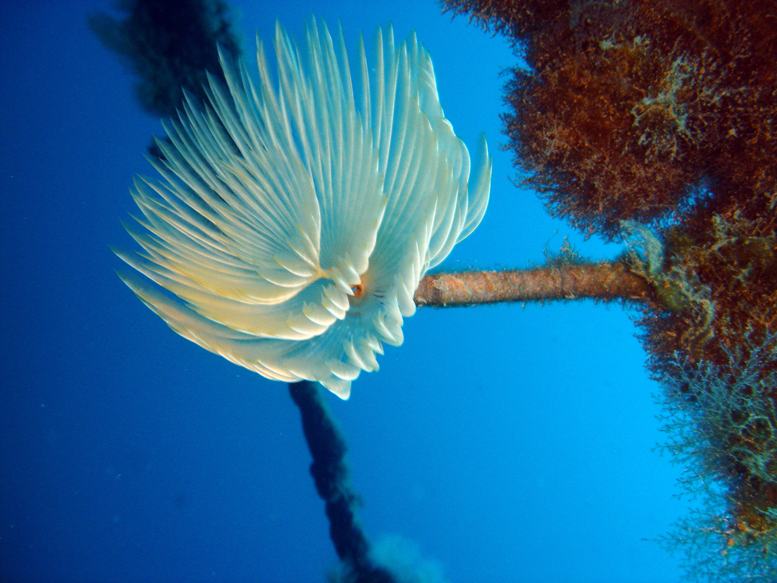 Spirographe.